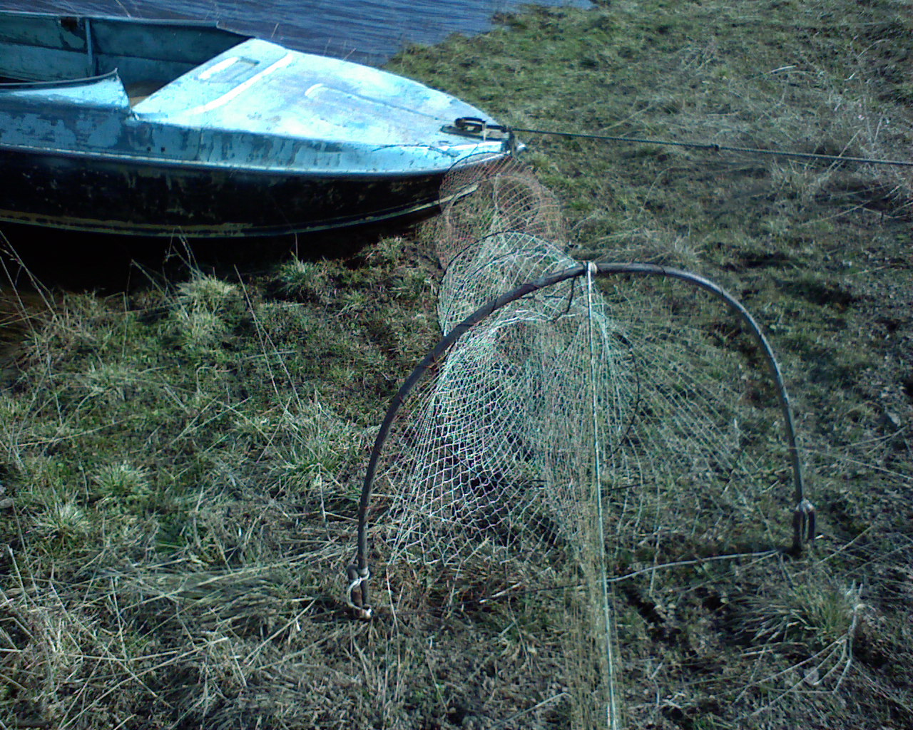 Вентерь (Мерёжа)